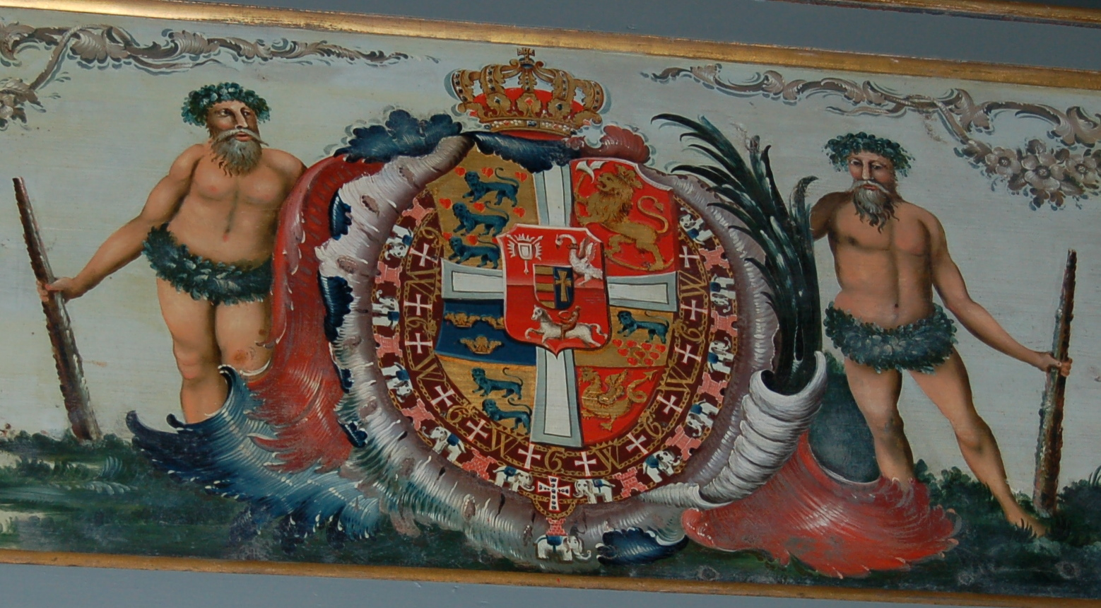 Frederik Vs våben, Stavern Kirke, Larvik (Laurvig), Norge. Våbenskjoldet er designet brugt 1721-1819/1820 (fra arvehyldningen i Slesvig, 1721 til fjernelsen af den norske løve fra rigsvåbenet (1819/20).